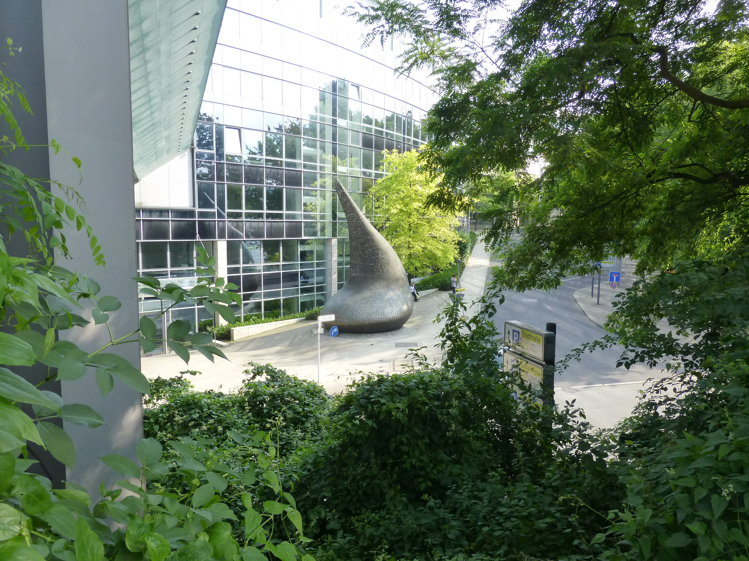 Immermannstraße, Wuppertal